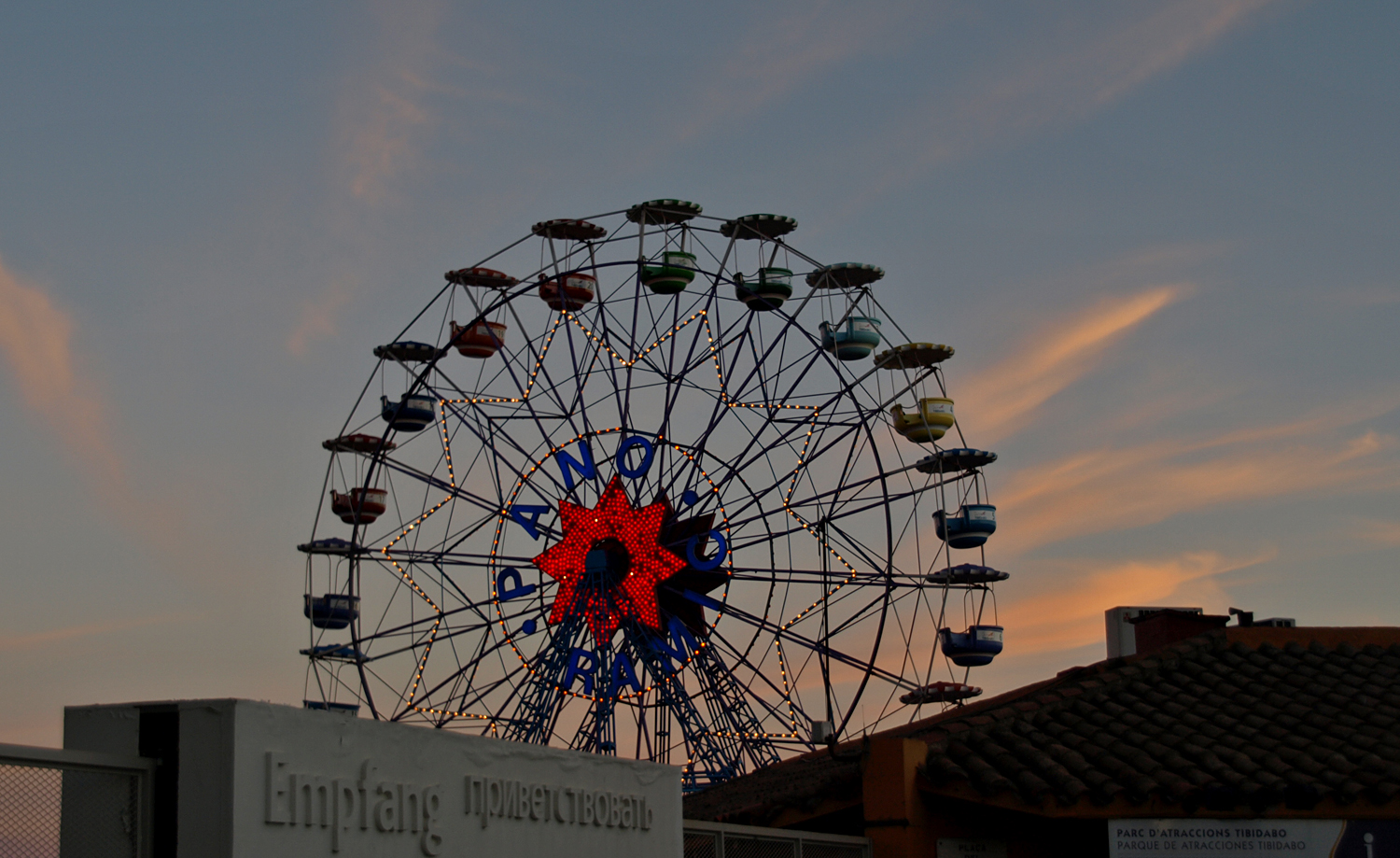 Parque de Atracciones Tibidabo (Barcelona)